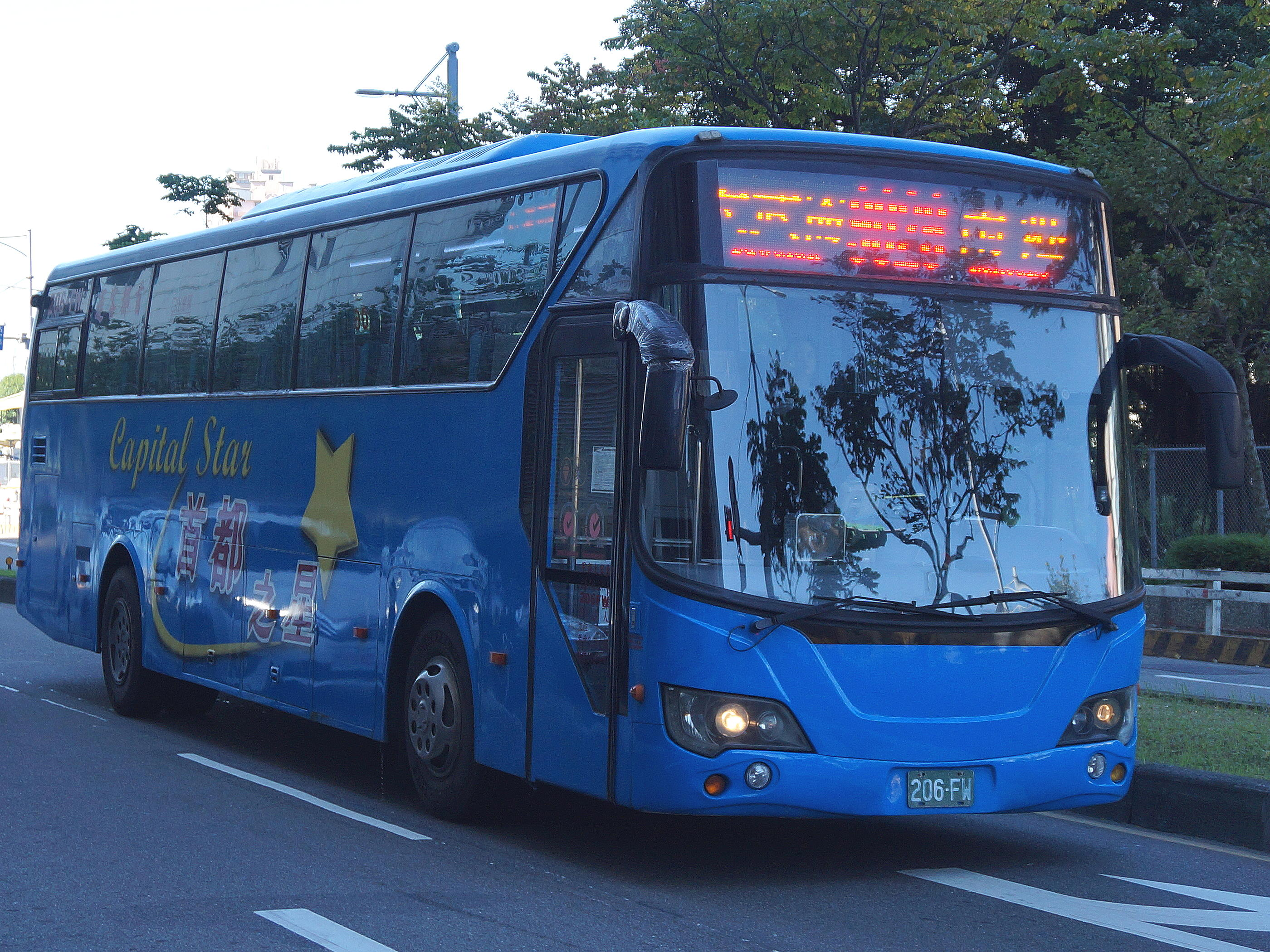 首都客運大宇BC211MA大客車206-FW行駛9026線。